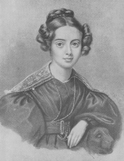 Porträtzeichnung der Christine Keilhau, geborene Kemp (1804-1862)